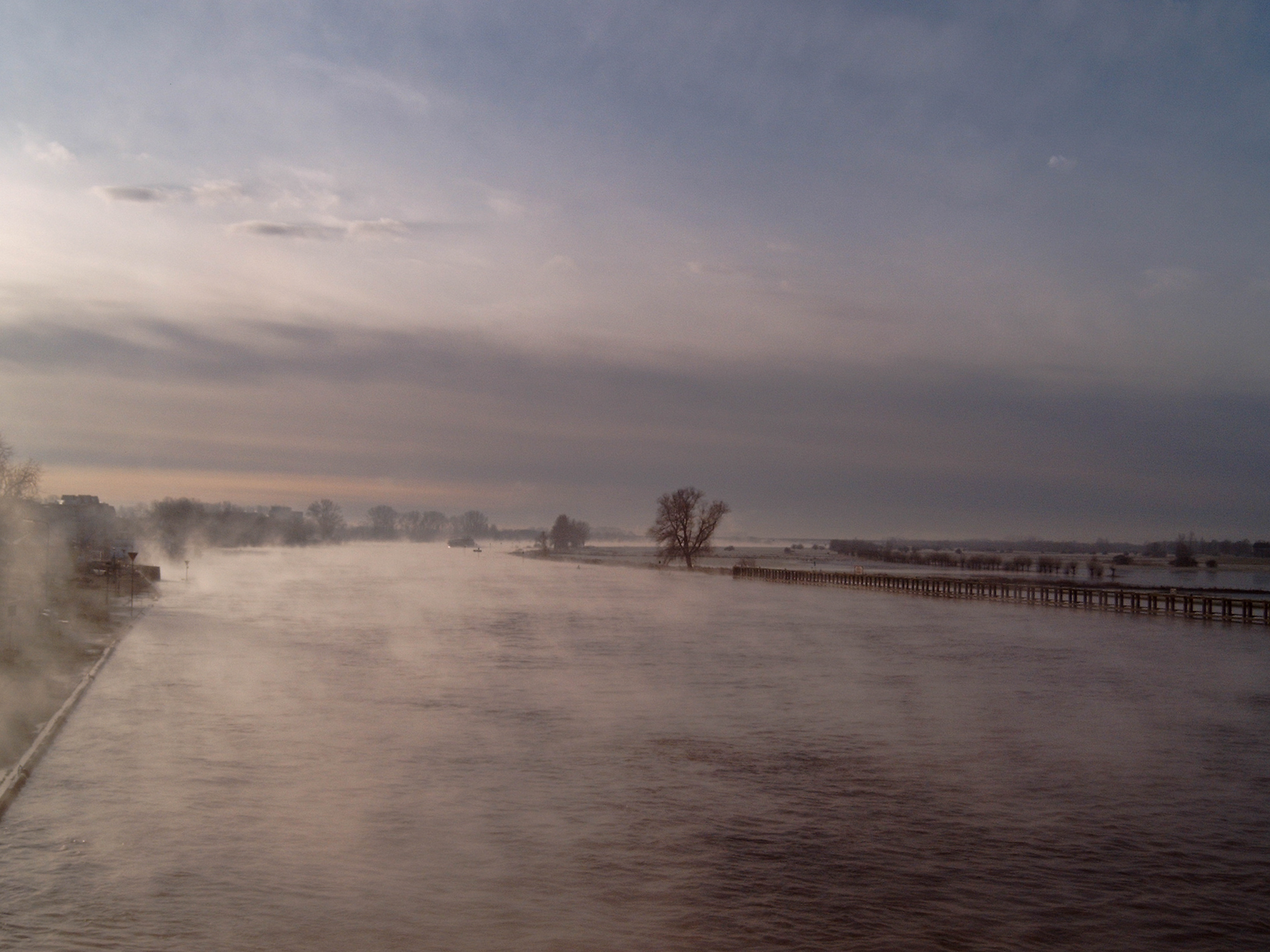 IJssel bij Zutphen vanaf spoorbrug